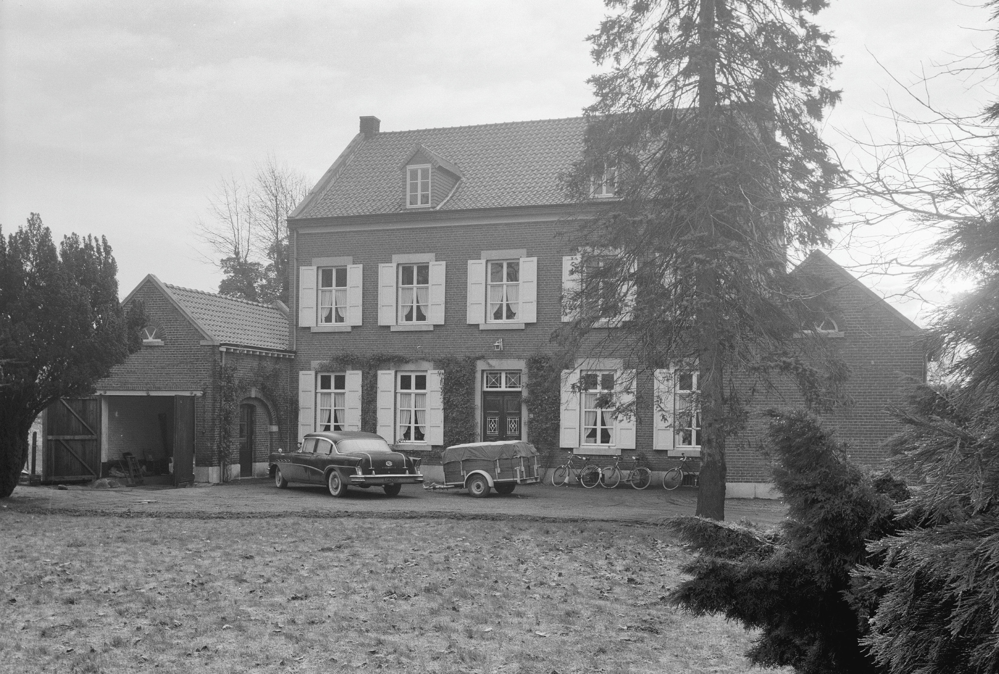 De Nieuwenhof"